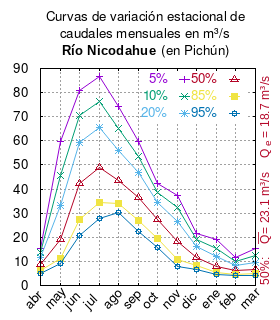 Curvas de variación estacional del río Nicodahue en Pichún. # Dirección General de Aguas # Diagnóstico y clasificación de los cursos y cuerpos de agua según objetivos de calidad. Cuenca del río Biobío. # Santiago de Chile # Ministerio de Obras Públicas (Chile) # 2004 # url: # urlarchivo: # Tabla 4.7: Estación Nicodahue en Pichún mes 5% 10% 20% 50% 85% 95% abr 15.28 13.54 11.69 8.84 6.26 5.12 may 59.64 45.50 33.23 19.27 11.32 9.01 jun 80.98 70.32 59.20 42.41 27.49 20.72 jul 86.87 76.43 65.53 49.08 34.47 27.84 ago 74.33 65.08 55.97 43.40 33.81 30.16 sep 59.52 53.43 46.88 36.51 26.84 22.40 oct 42.26 38.66 34.49 27.22 19.52 15.60 nov 37.36 32.16 26.63 18.16 10.83 7.82 dic 21.58 18.89 16.08 11.82 8.09 6.48 ene 19.24 15.48 12.09 8.01 5.48 4.68 feb 11.73 9.94 8.26 6.11 4.64 4.14 mar 15.16 12.29 9.72 6.66 4.80 4.22 This plot was created with Gnuplot.